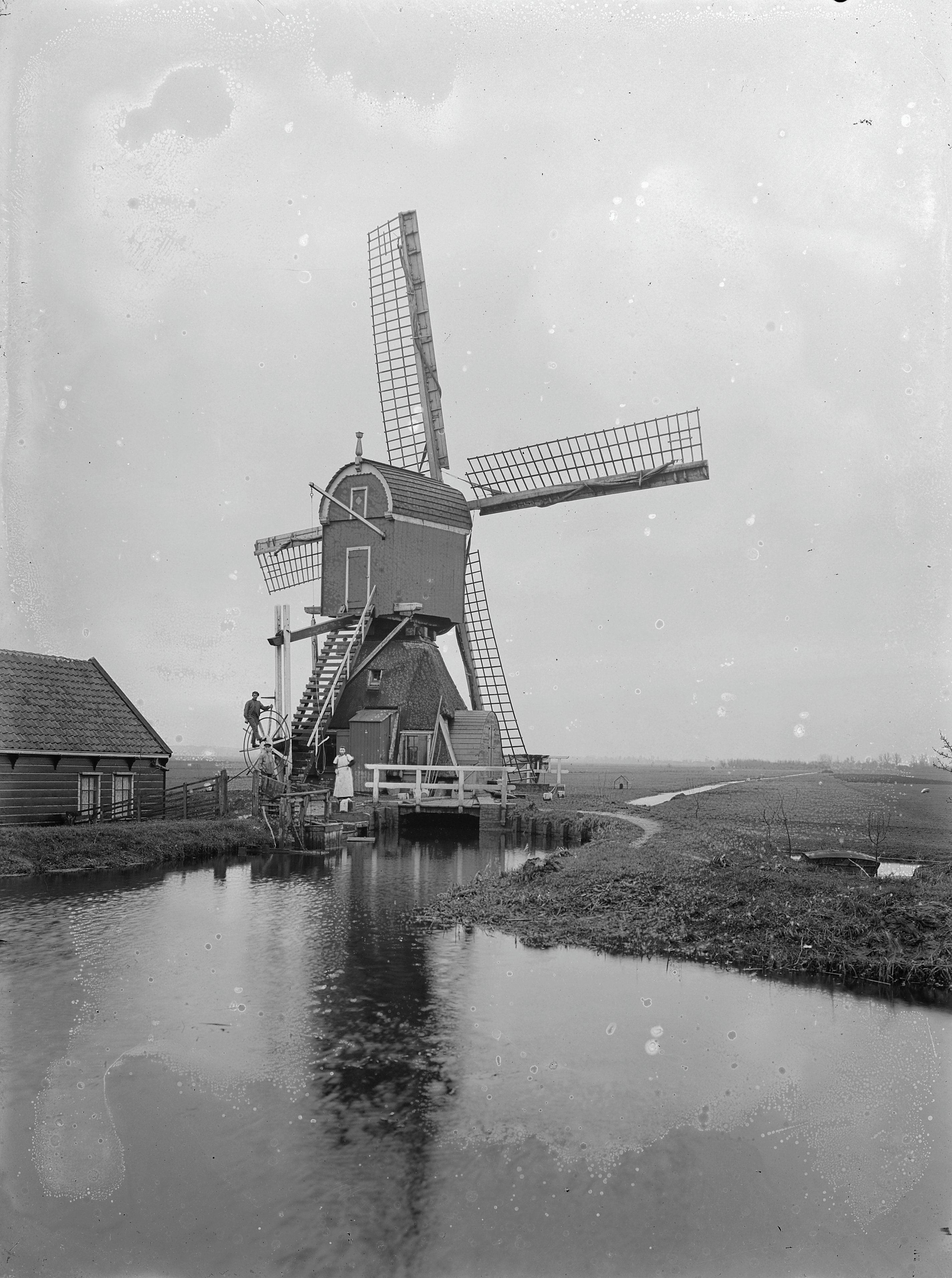 Wipwatermolen: Wipwatermolen in de Kleine Winkelpolder, gesloopt in ca. 1922 (opmerking: In: Buiten ; 13(1919), nr. 5, p. 49)